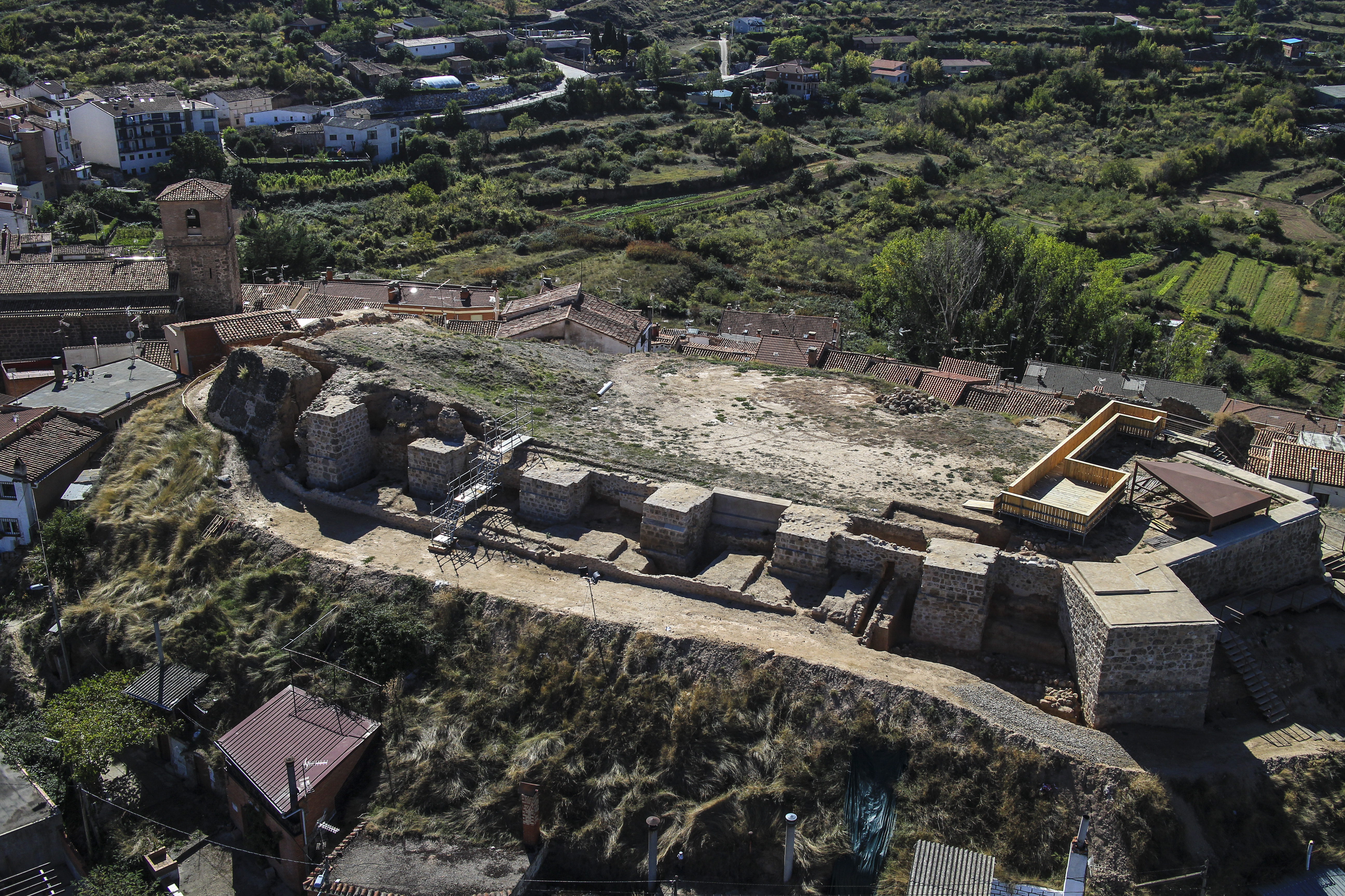 Fotografía aérea del frente norte